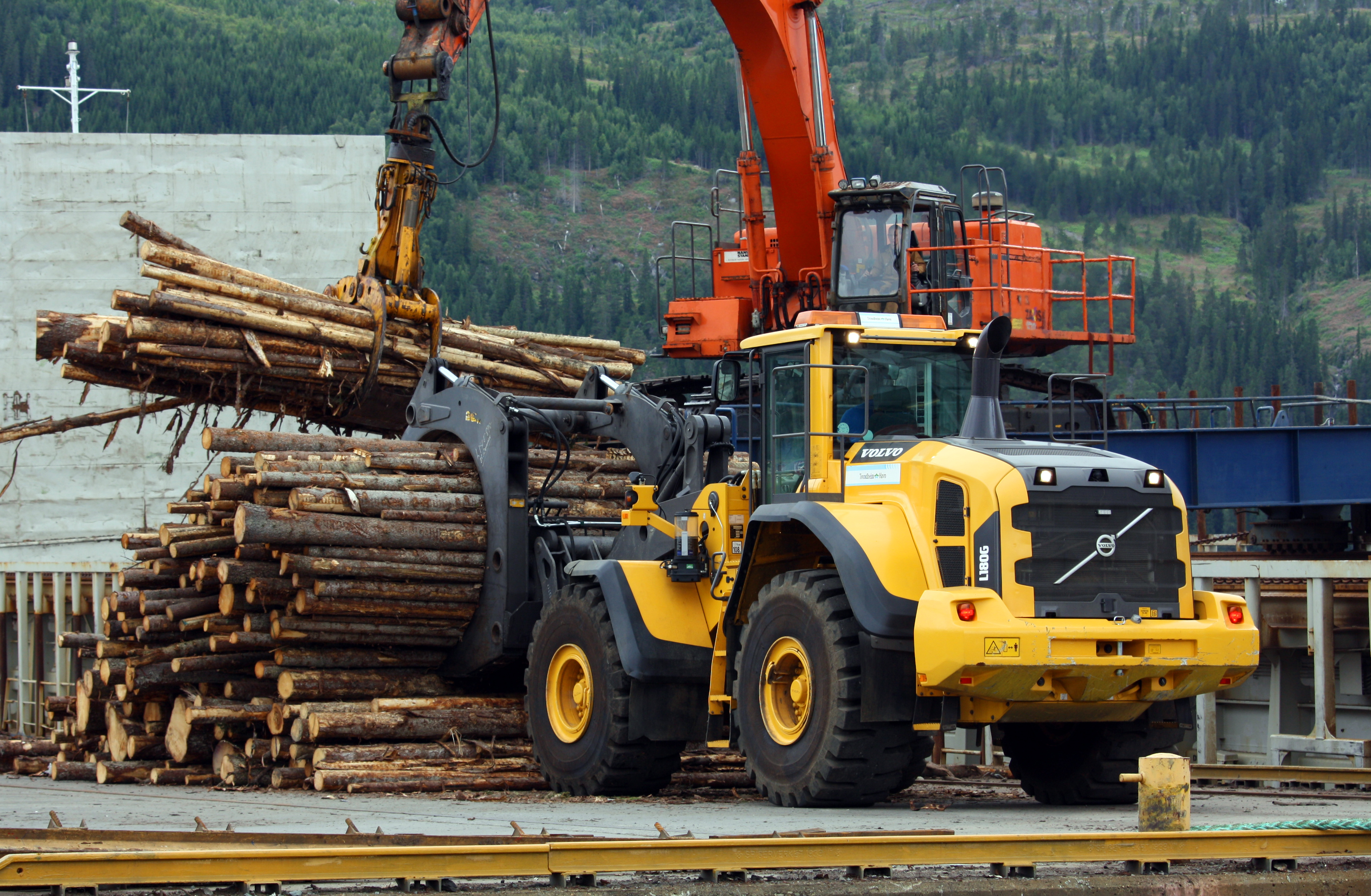 Tømmer lastes i Orkanger havn med kurs for Norske Skog på Skogn.